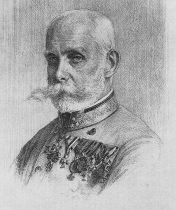 Archduke Rainer Ferdinand of Austria Rainer von Österreich (1827–1913) aka Rainer Ferdinand Erzherzog von Österreich